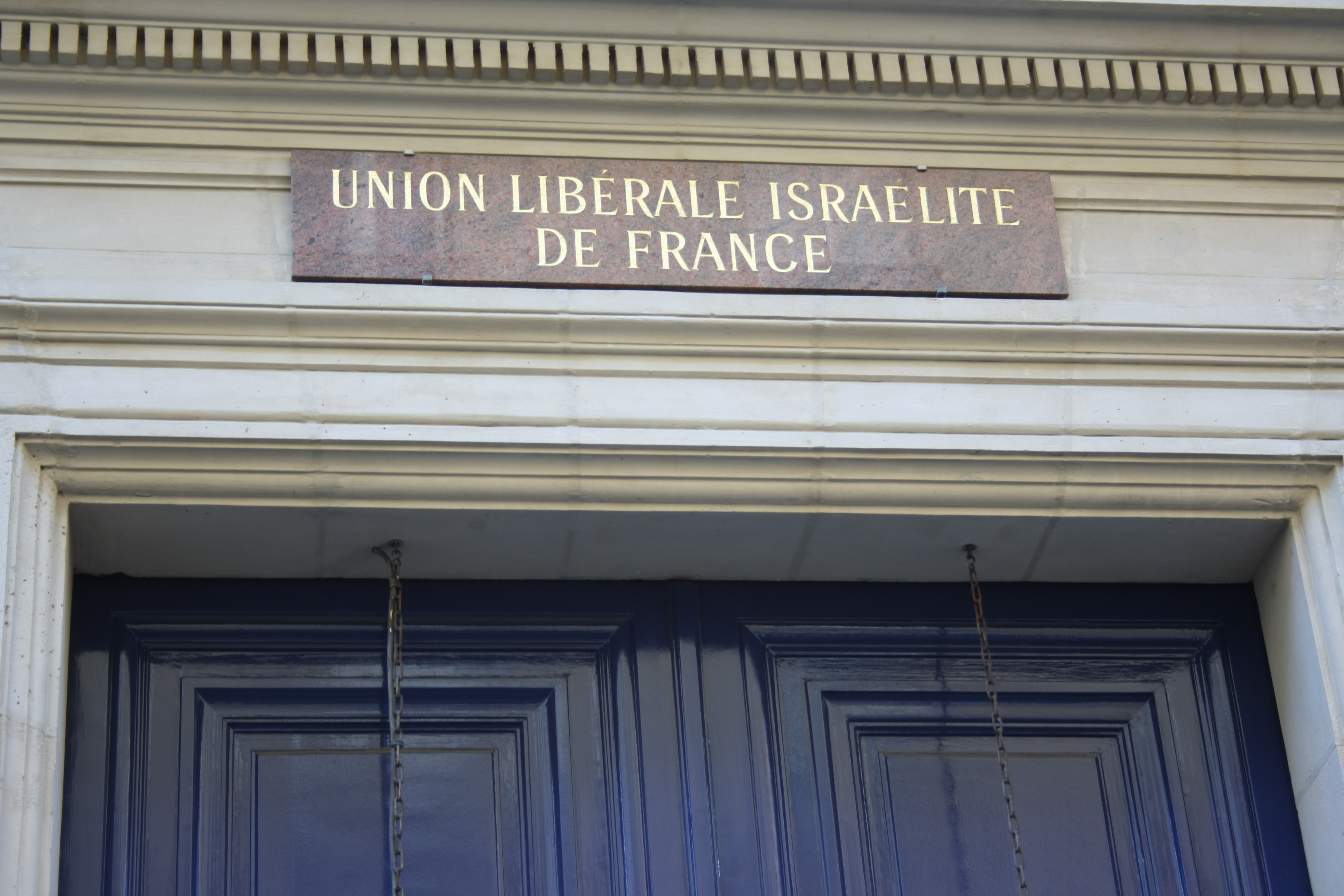 Synagoge der Rue Copernic (auch Synagoge der Union Libérale Israélite de France genannt), 24, rue Copernic, im 16. Arrondissement von Paris, Schild über dem Hauseingang